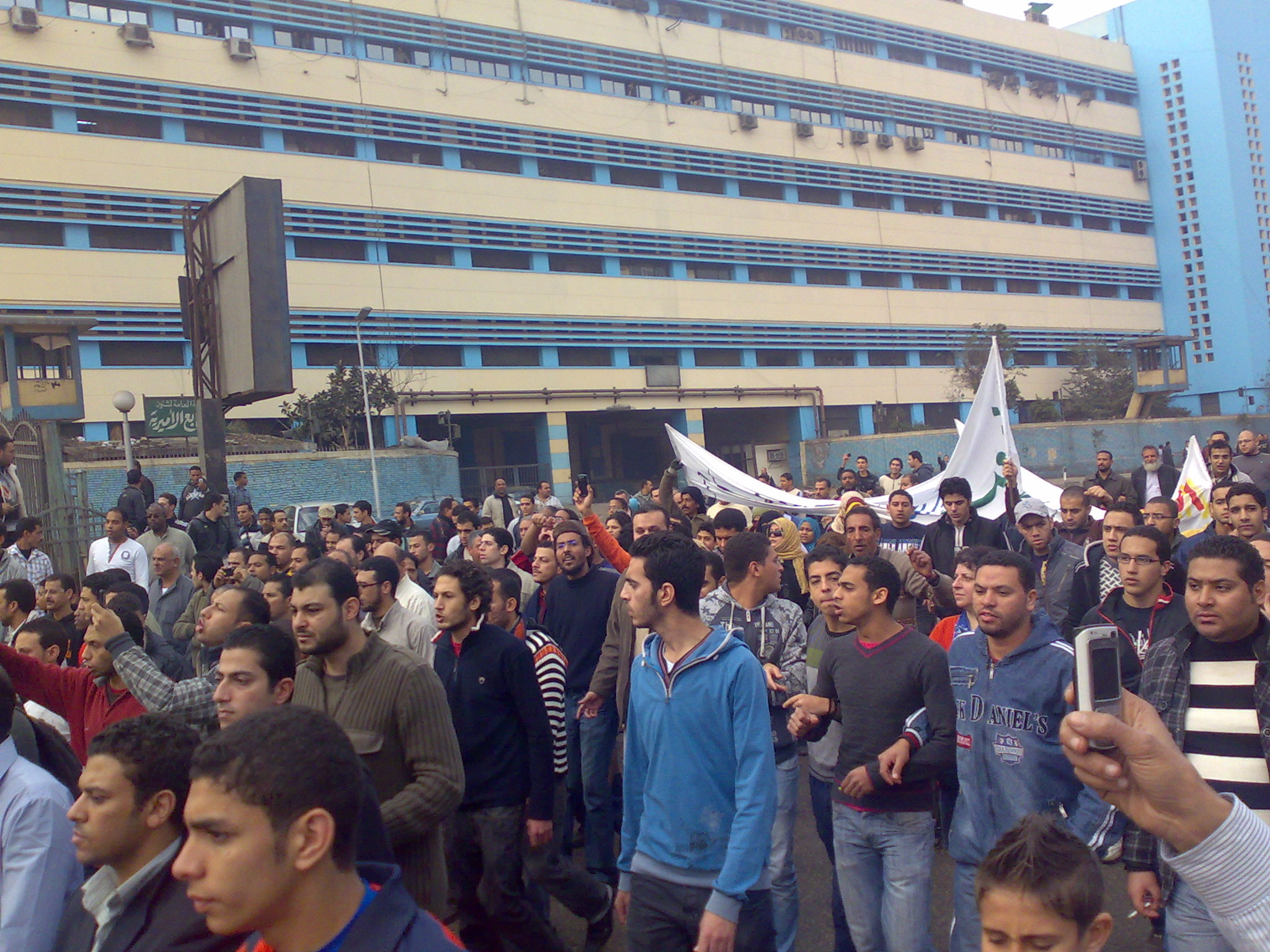 28 January Marching in Imbaba, Cairo.